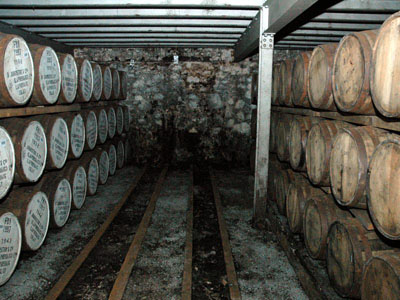 在傳統的舖地式倉庫(Dunnage Warehouse)中儲存陳年的蘇格蘭麥芽威士忌 相對於規模龐大的堆疊式(Racked)倉庫，傳統的舖地式倉儲方式橡木桶被規定最多只能疊到三層，一方面是因為超過這高度後橡木桶內的威士忌與地面之間將失去互動的可能，另一方面則是這種儲存法能將橡木桶暴露在空氣中的表面積提升，促進桶內外氣體的互換。 本照片拍攝於艾拉島上著名的拉弗格(Laphroaig)蒸餾廠最靠近海邊的一號倉庫。 本圖片由上傳者zh:User:SElephant拍攝於2004年8月。